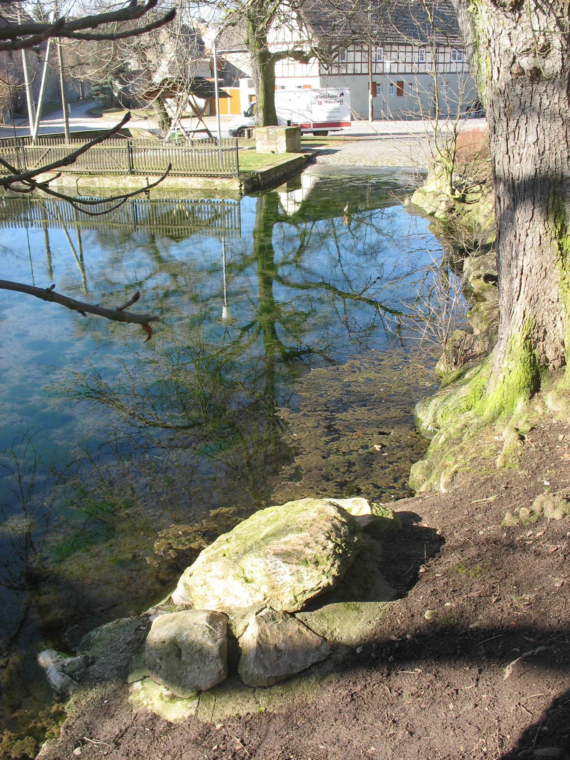 Einzingen – Nagelstein und Bauernstein vom Kriegerdenkmal aus gesehen.This is a photograph of an architectural monument. 83579